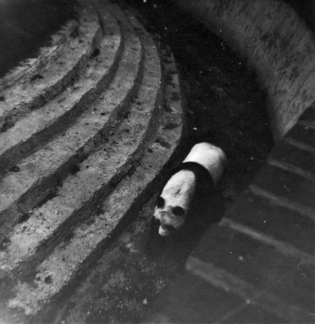 Chi Chi, Giant Panda, London Zoo, Camden, taken 1967